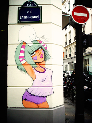 Rue Saint-Honoré, boutique Colette, Paris, France.